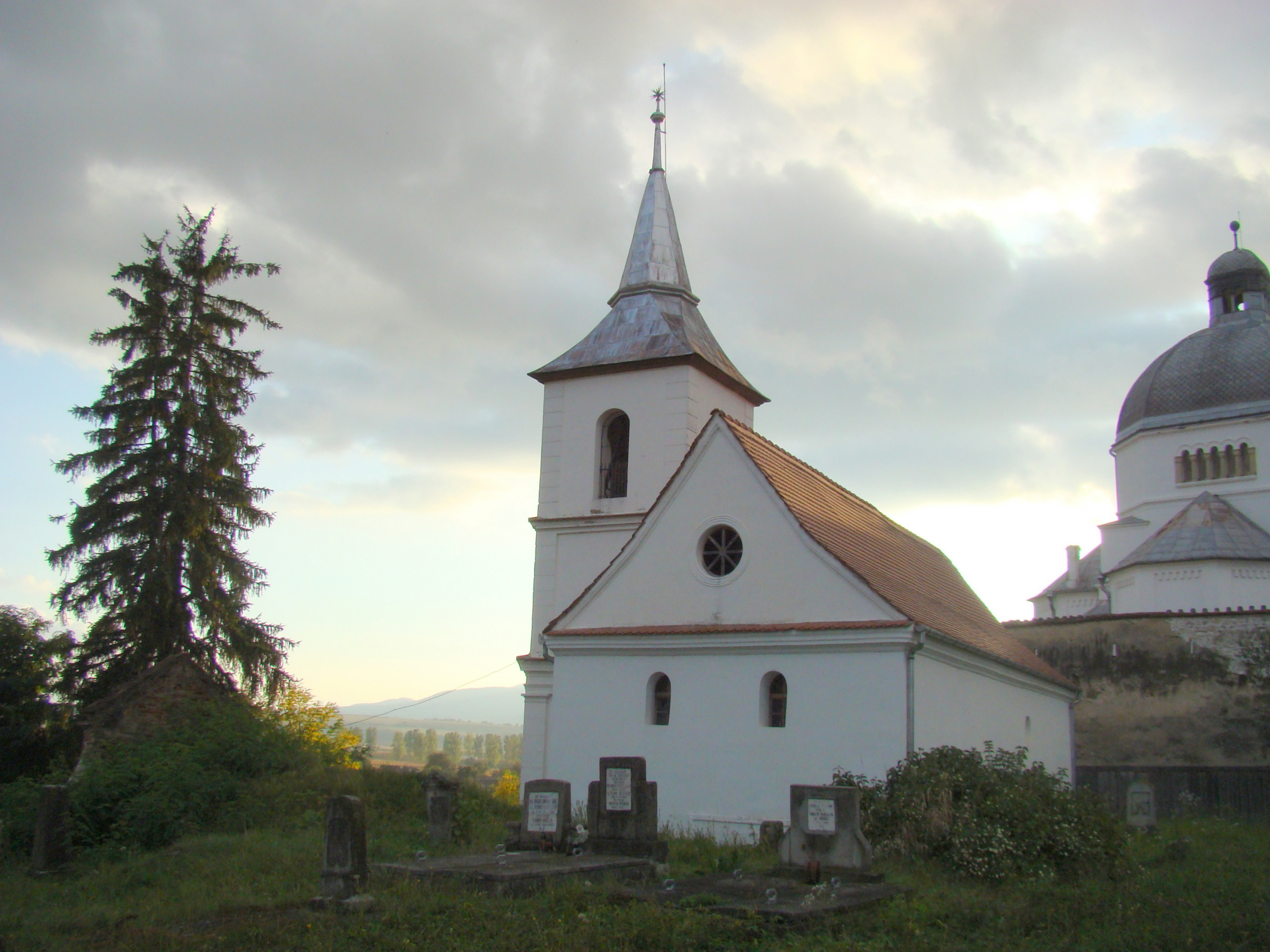 Biserica reformată, sat Belin; comuna Belin 612 1770 (biserica), 1911 (turn)